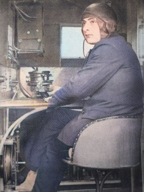 Opérateur radiotelegraphiste navigant, les communications aéronautiques en radiotélégraphie étaient dans la bande comprise de 325 kHz à 405 kHz. En vol une antenne pendante longue de 120 mètres à 450 mètres était déroulée pour établir les communications radios. Proche du sol cette antenne est rembobinée sur un touret à manivelle. À l'extrémité de l'antenne pendante un plomb de lestage porte l'indicatifs radio de l'aéronef. Et l'antenne fixe sur le fuselage est utilisé en permanence. 1 800 mètres postes maritimes intercontinentaux pour l'échange des correspondances en mer. (166,66 kHz) puis (sur 143 kHz) 900 mètres longueur d'onde du service aéronautique en radiotélégraphie (ballons dirigeables, aéronefs). (333,33 kHz) 600 mètres Longueur d'onde de détresse et d'appel en radiotélégraphie (500 kHz) 450 mètres longueur d'onde de radiogoniométrie (positions des navires, des ballons dirigeables, des aéronefs) (666,66 kHz) puis (sur 410 kHz à présent)